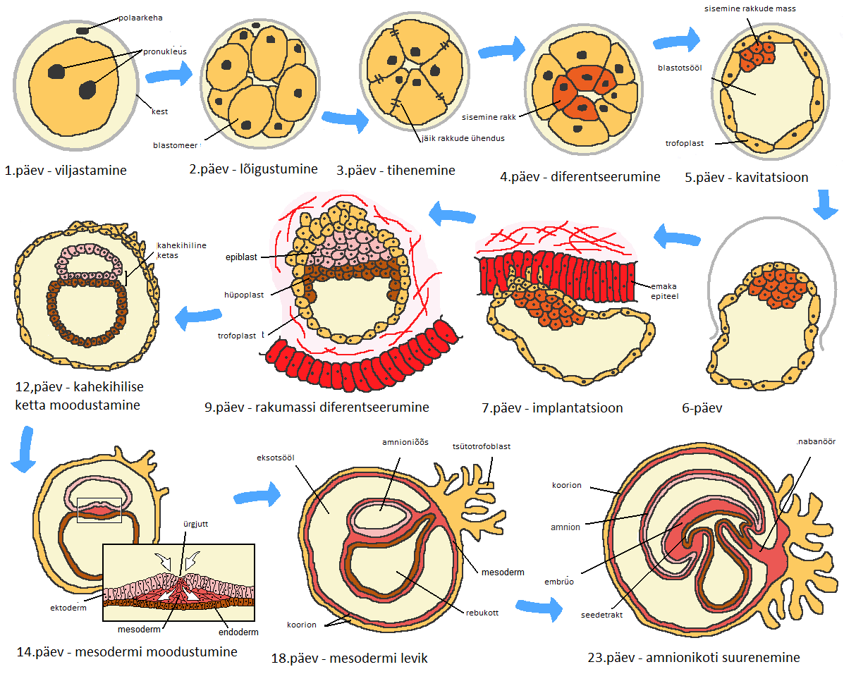 Inimese embrüogenees